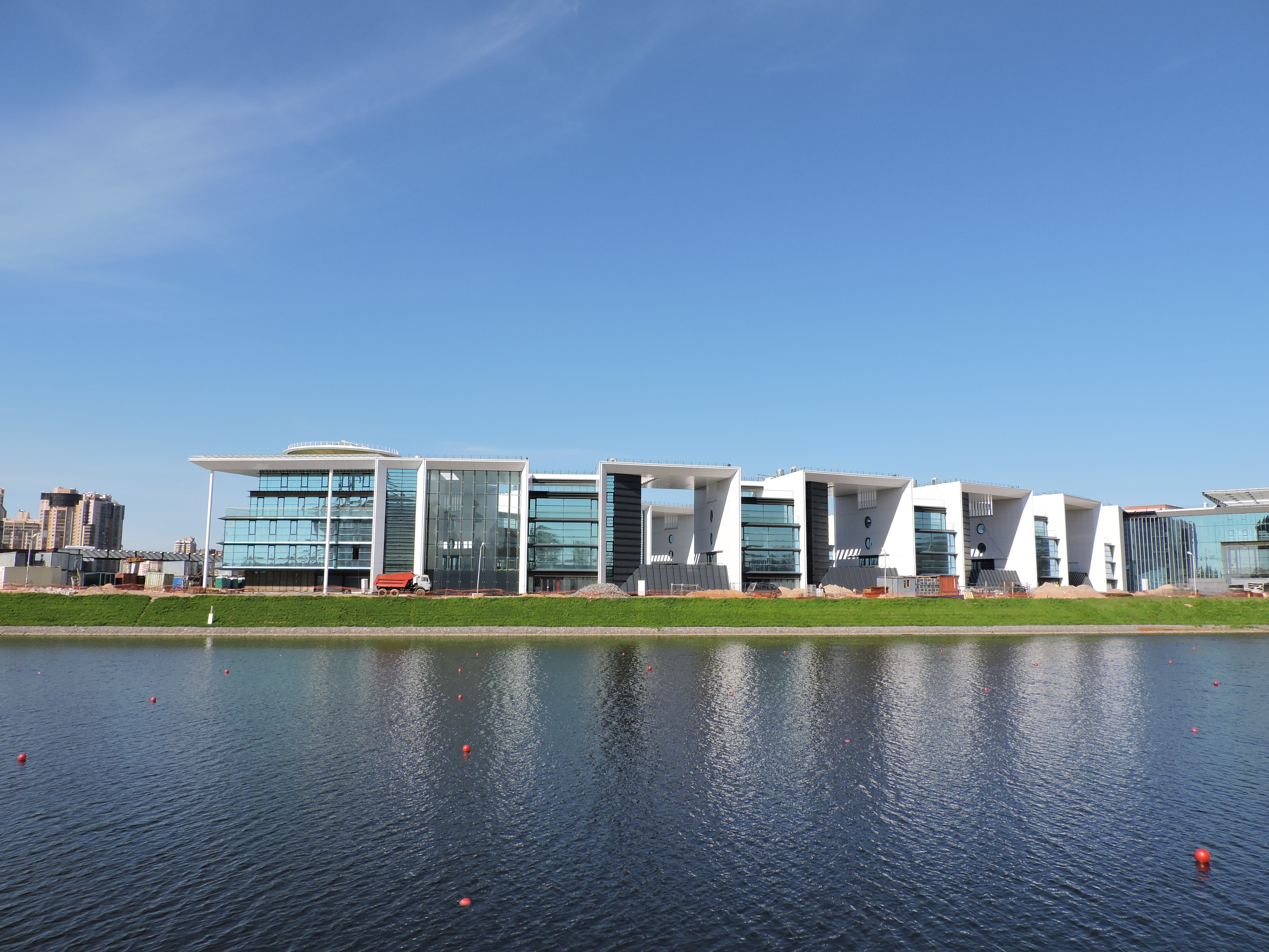 Санкт-Петербург. Крестовский остров